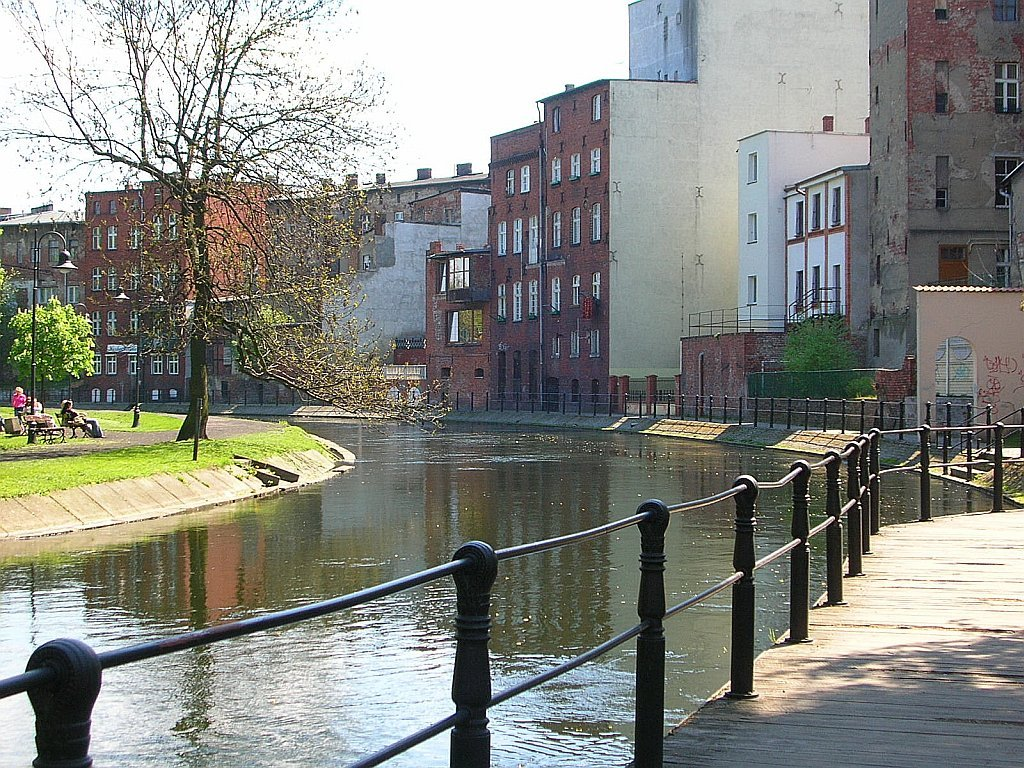 Na Wyspie Młyńskiej w Bydgoszczy; Wenecja Bydgoska